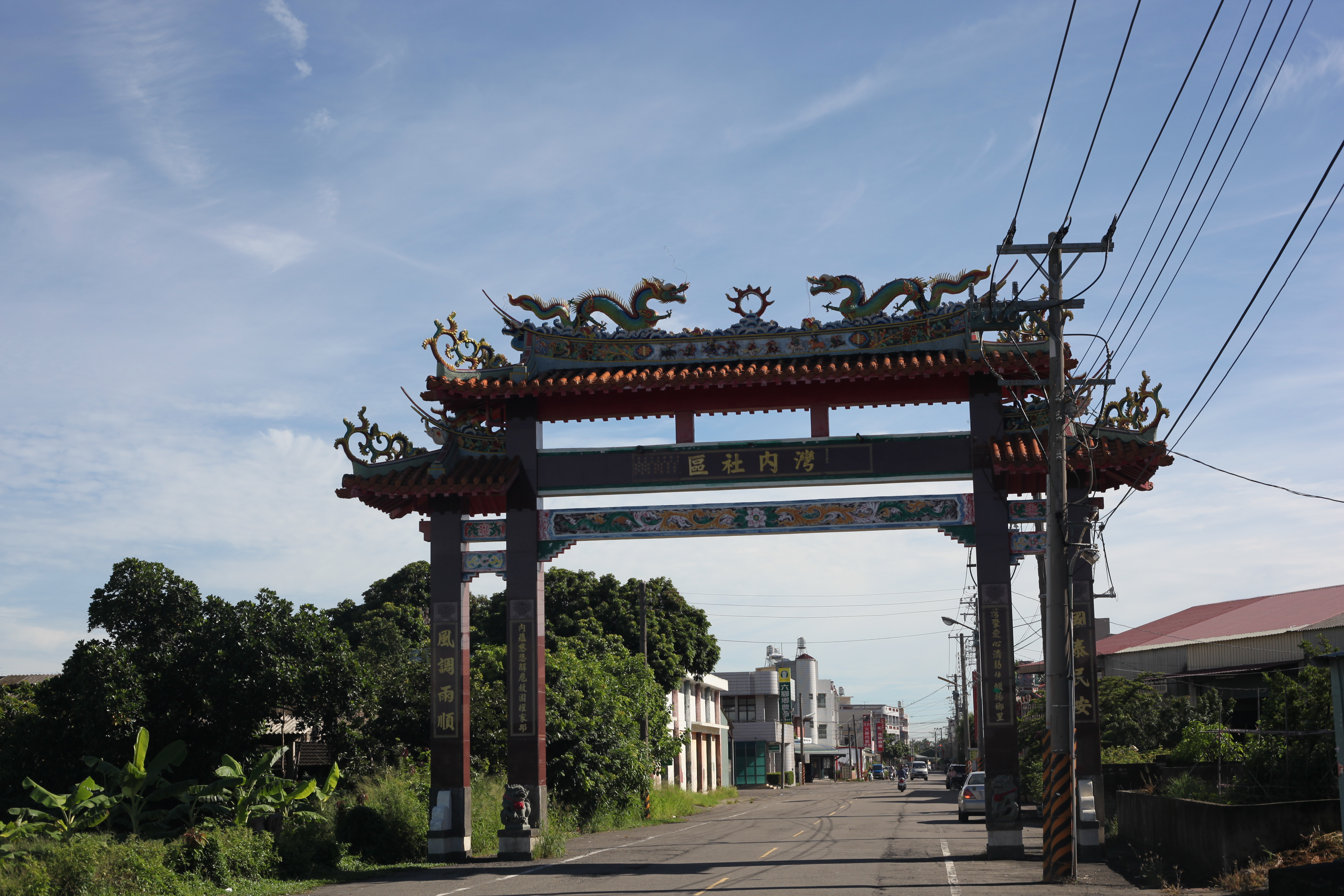 嘉義縣六腳鄉灣內社區牌樓